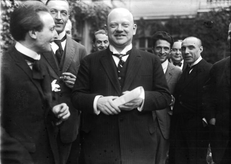 Gartenfest für Vertreter der Ausländischen Presse beim Reichskanzler Dr. [Gustav] Stresemann. Der Reichskanzler inmitten ausländischer Journalisten.